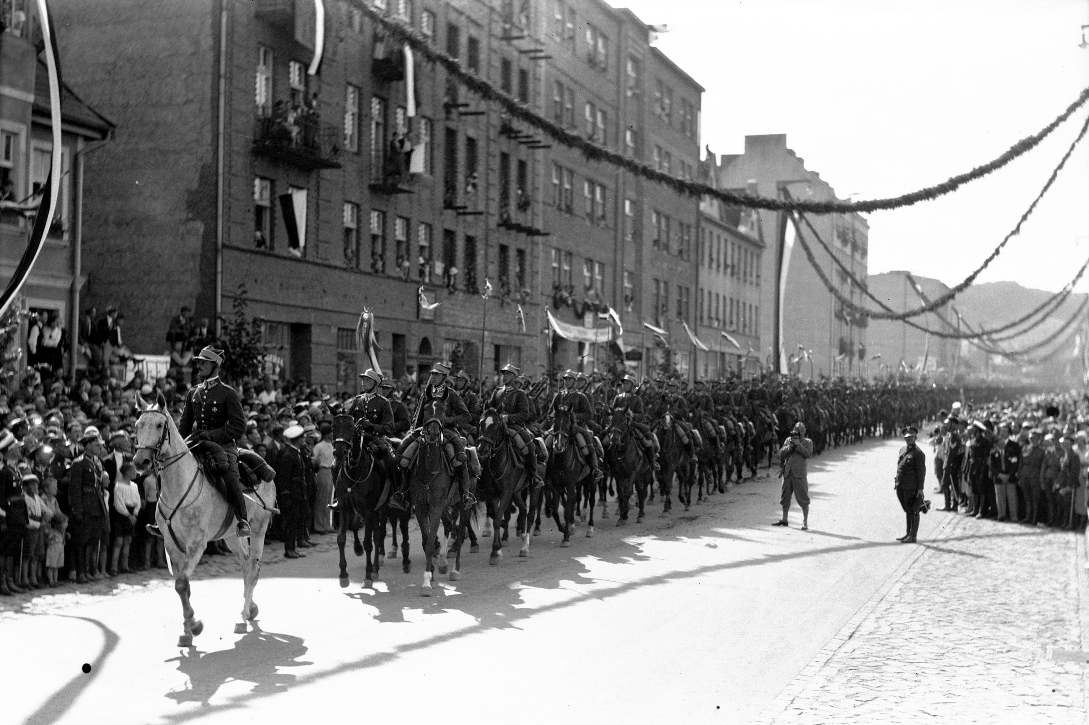 Obchody Święta Morza w Gdyni 31 lipca 1932 - kawalerzyści z 18 Pułku Ułanów Pomorskich podczas defilady. Koncern Ilustrowany Kurier Codzienny - Archiwum Ilustracji. Sygnatura: 1-P-3543-124